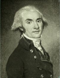 Self-portrait